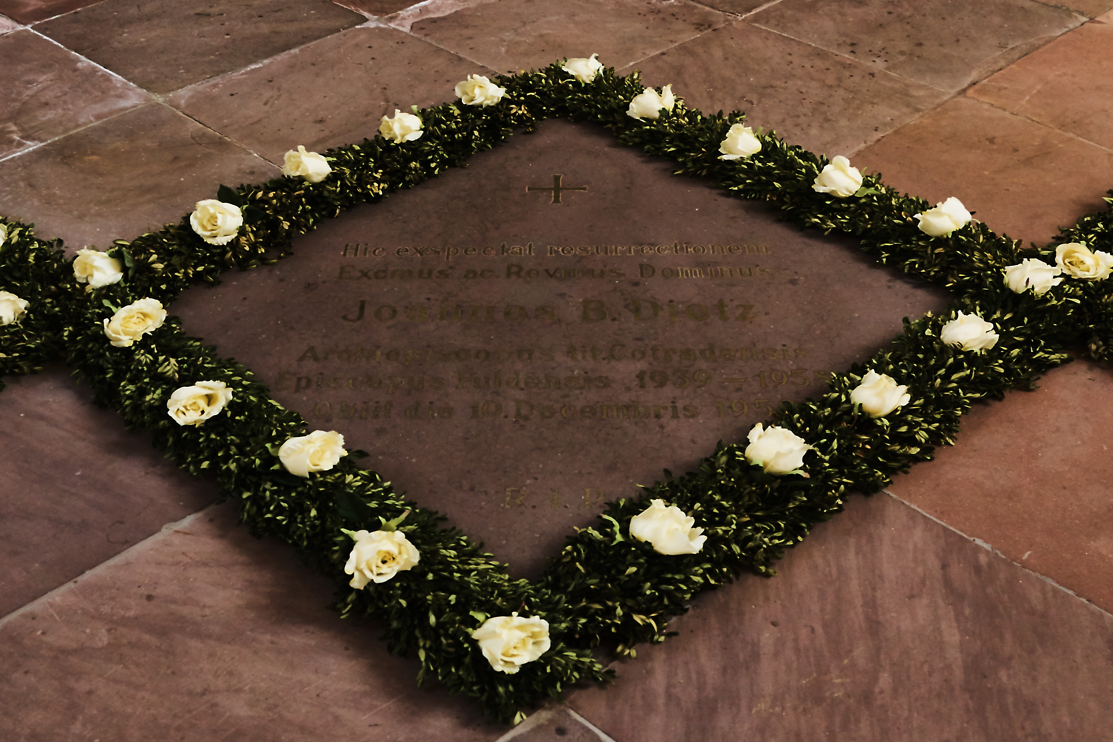 Grabmal von Johannes Dietz